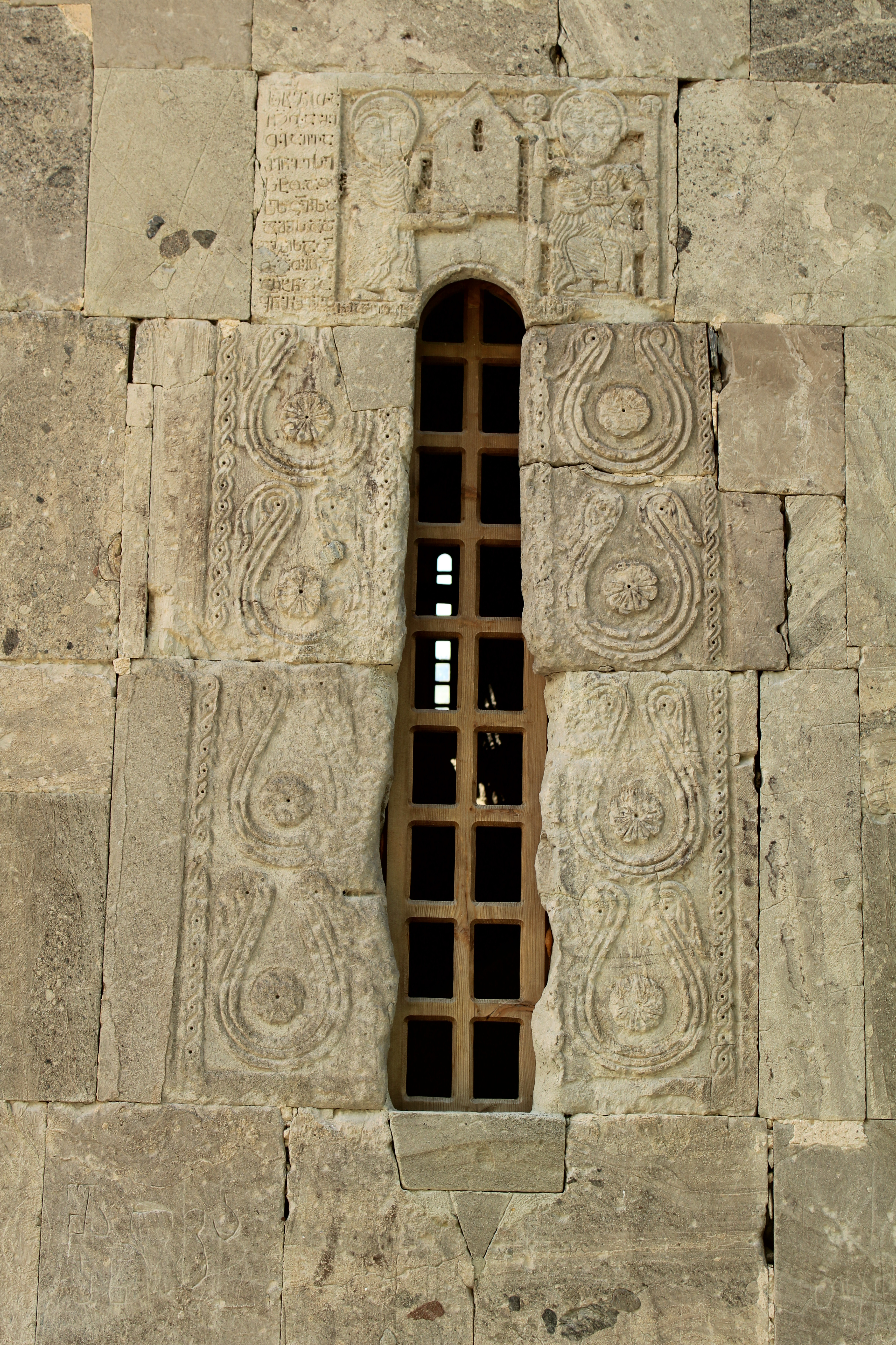 მთავარი ეკლესია